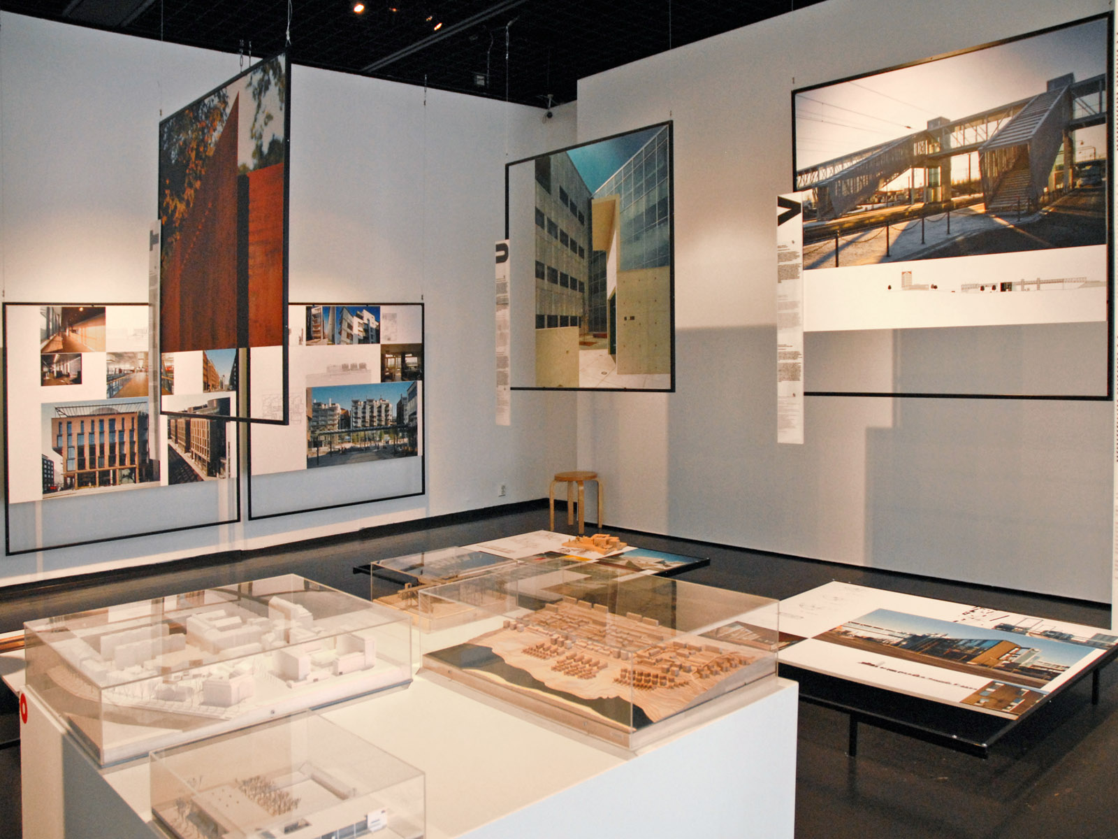 Salle d'exposition sur des réalisations architecturales contemporaines Le musée d'architecture, situé à proximité du musée du design, présente des expositions temporaires sur des réalisations architecturales en Finlande. Il dispose d'une importante bibliothèque, d'un centre d'archives et de maquettes de bâtiments.